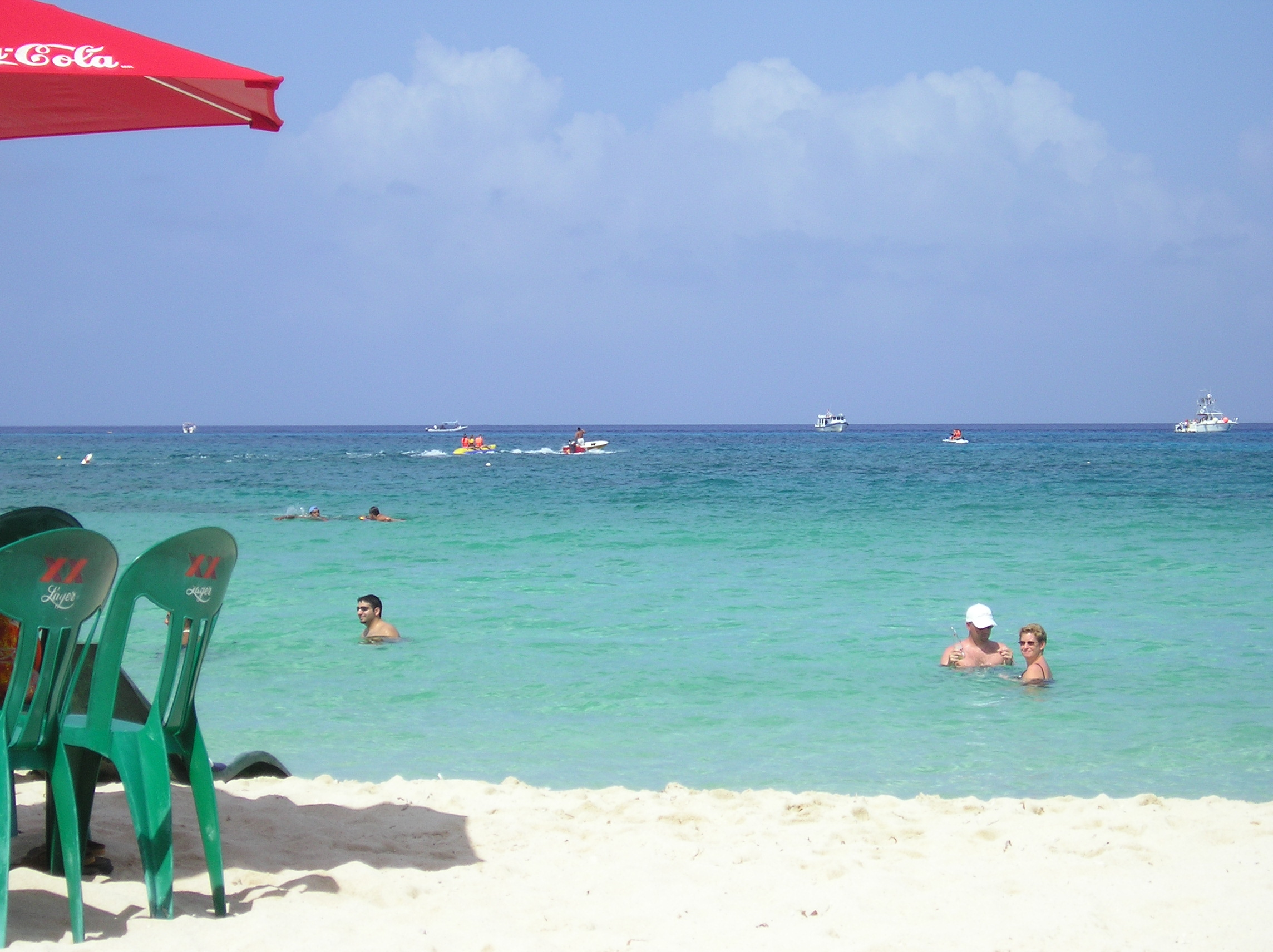 Beach on Cozumel.